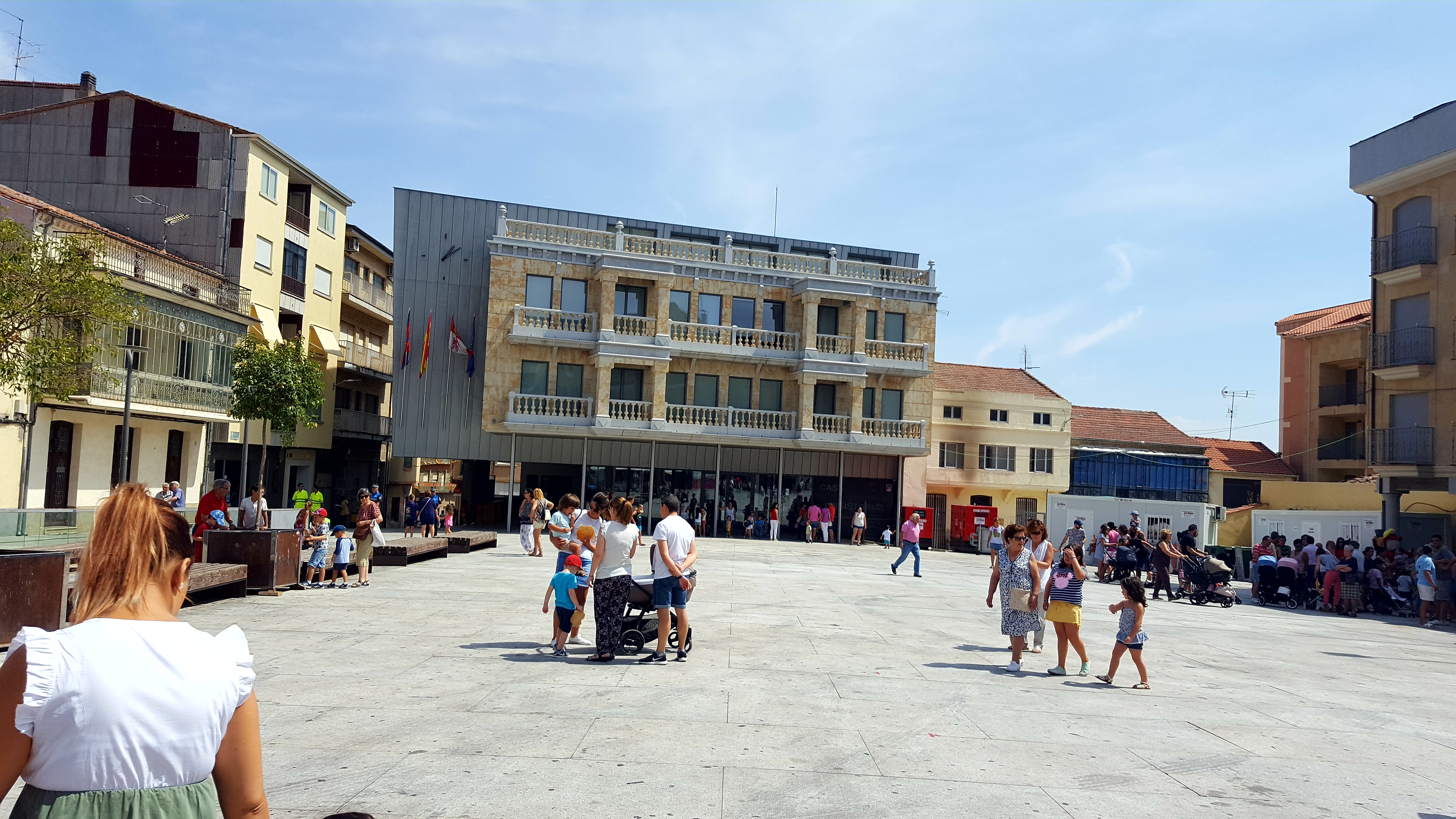 Edificio del ayuntamiento Guijuelo Salamanca